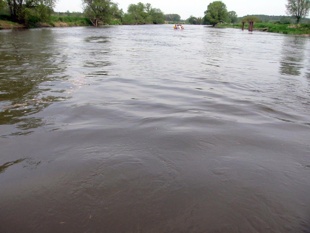 Die Saale bei Leißling in der Nähe von Weißenfels.